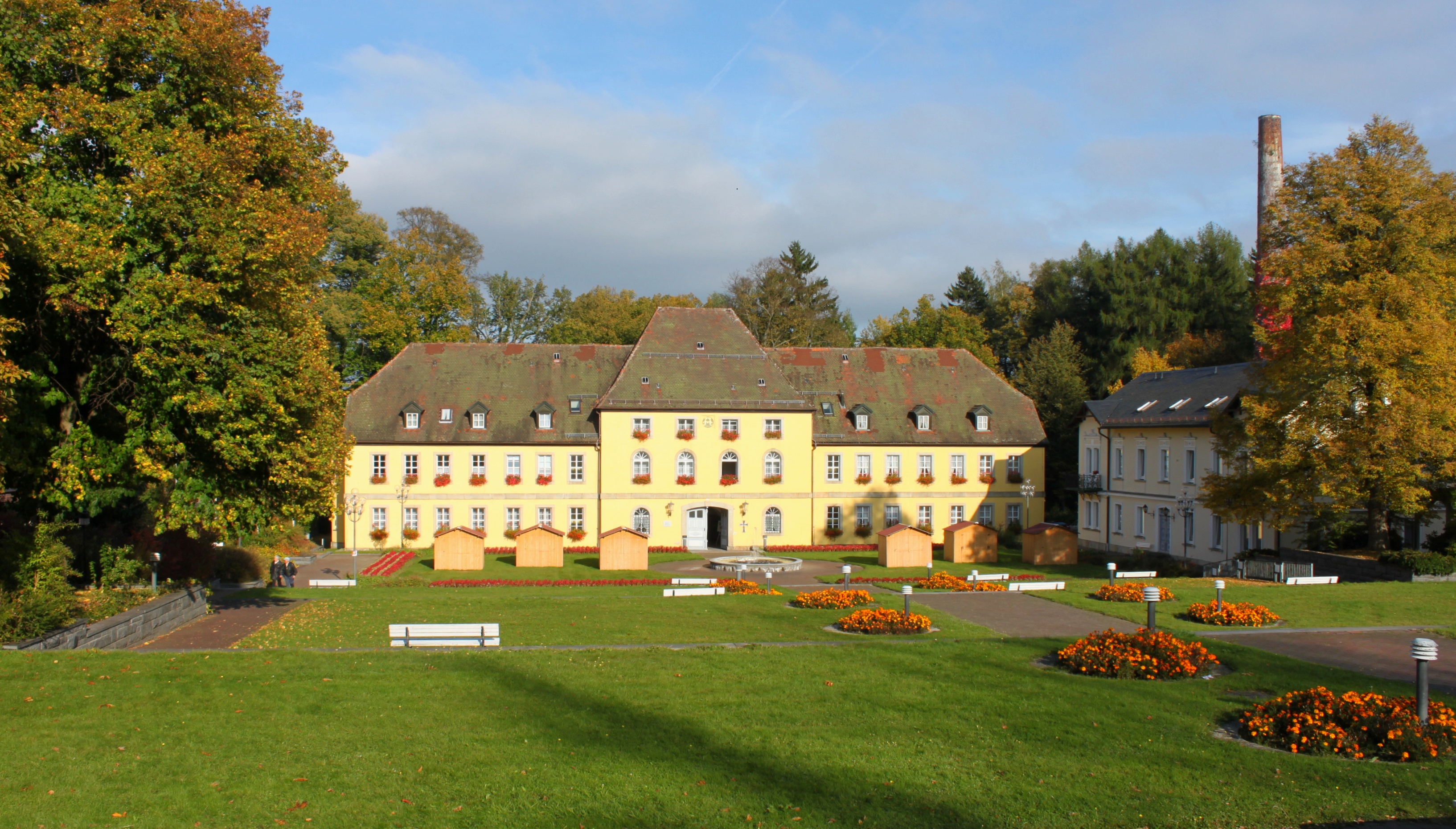 Das Schloss Alexandersbad ist gar kein richtiges Schloss, denn es wurde gewissermaßen als Hotel zur Unterbringung von Kurgästen erbaut